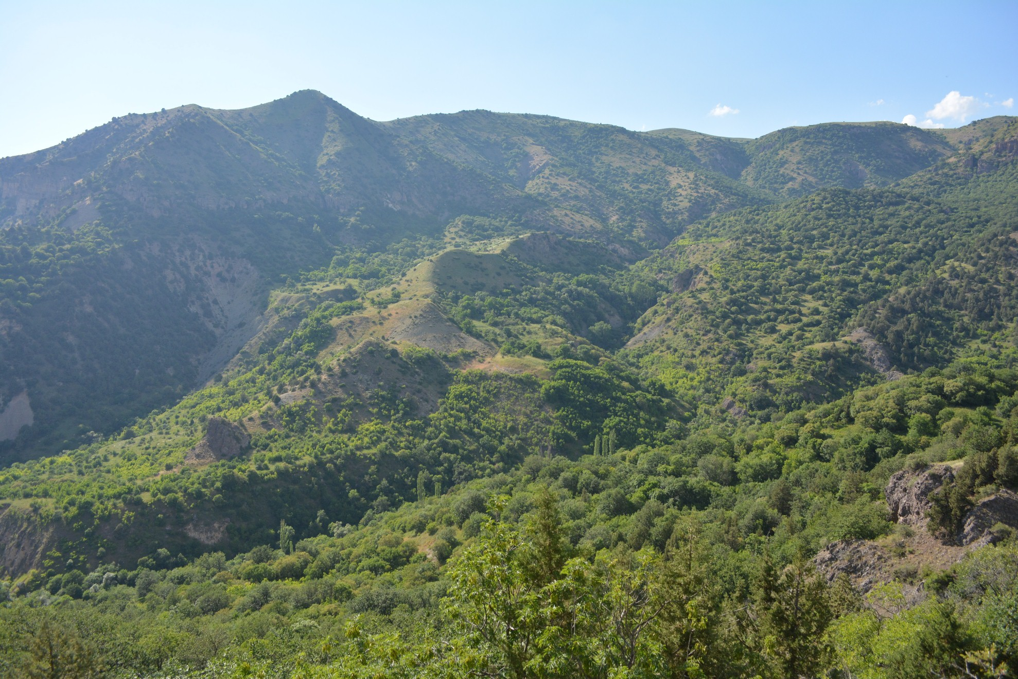 Խոսրովի անտառ